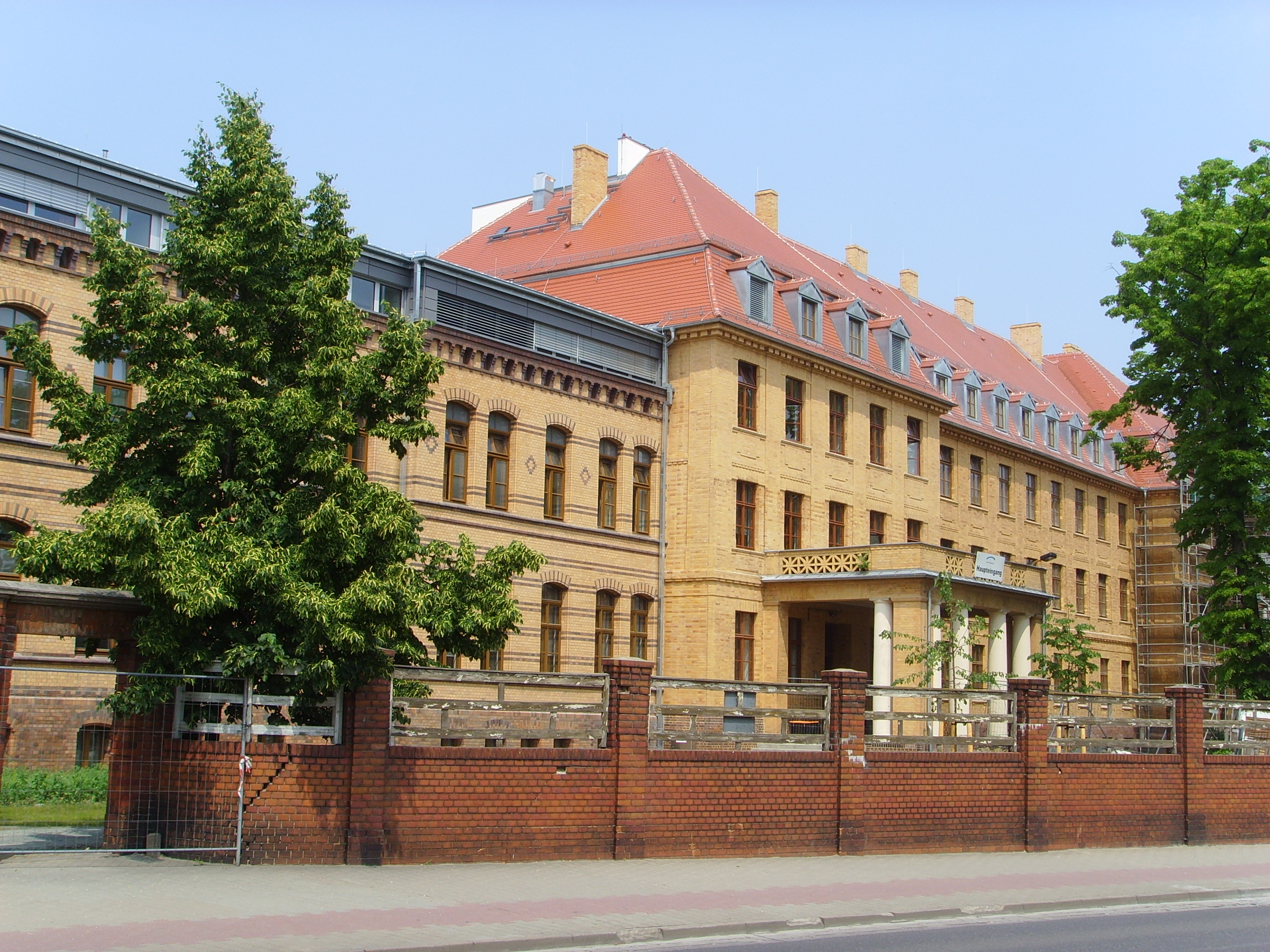 Das Krankenhaus in Senftenberg